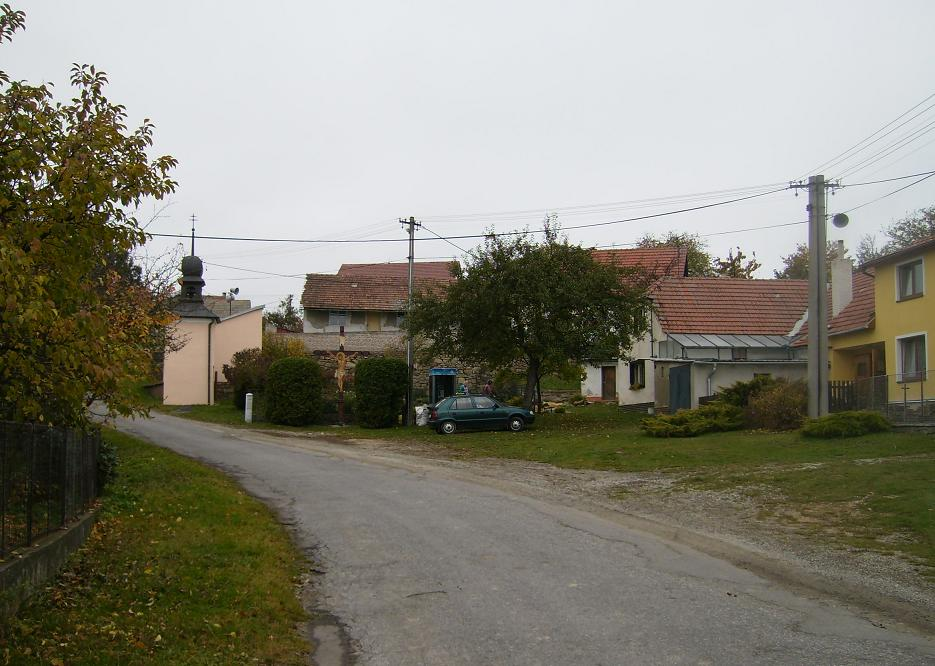 Milešín na Moravě (u Velké Bíteše)